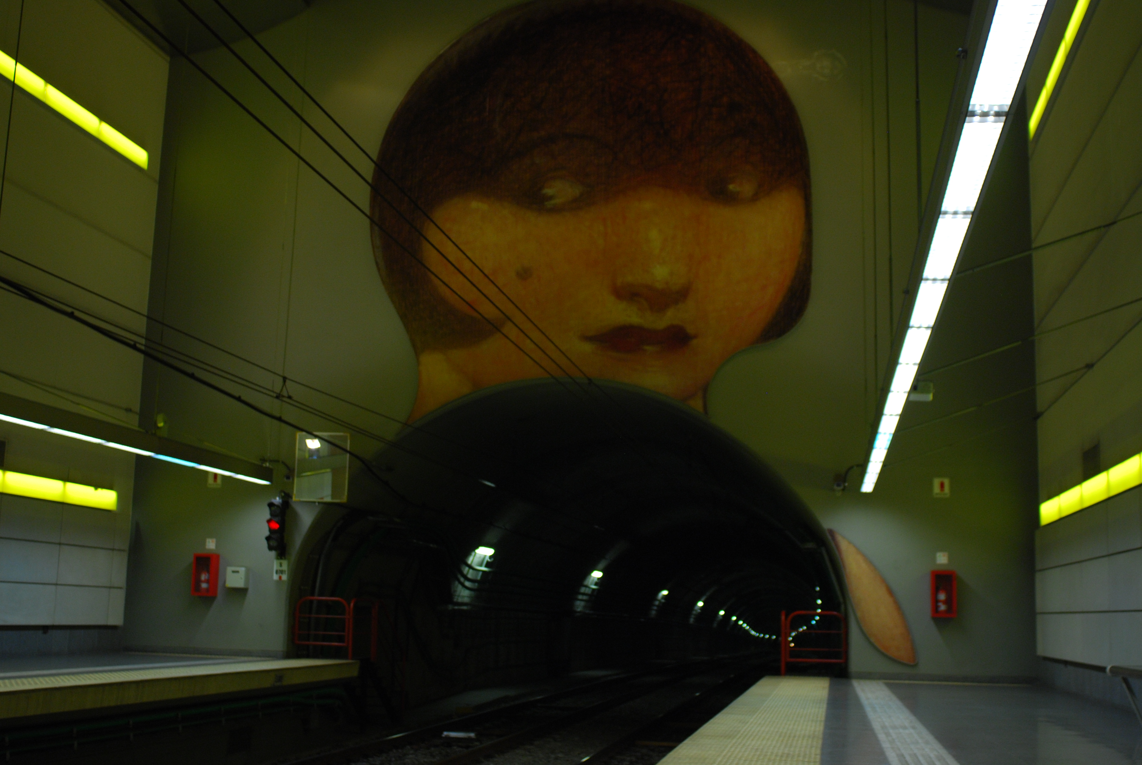 Línea H de subtes en Buenos Aires, mural sobre el túnel en la estación Venezuela (Argentina, noviembre 2008).jpg